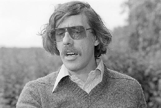 Jan Keja